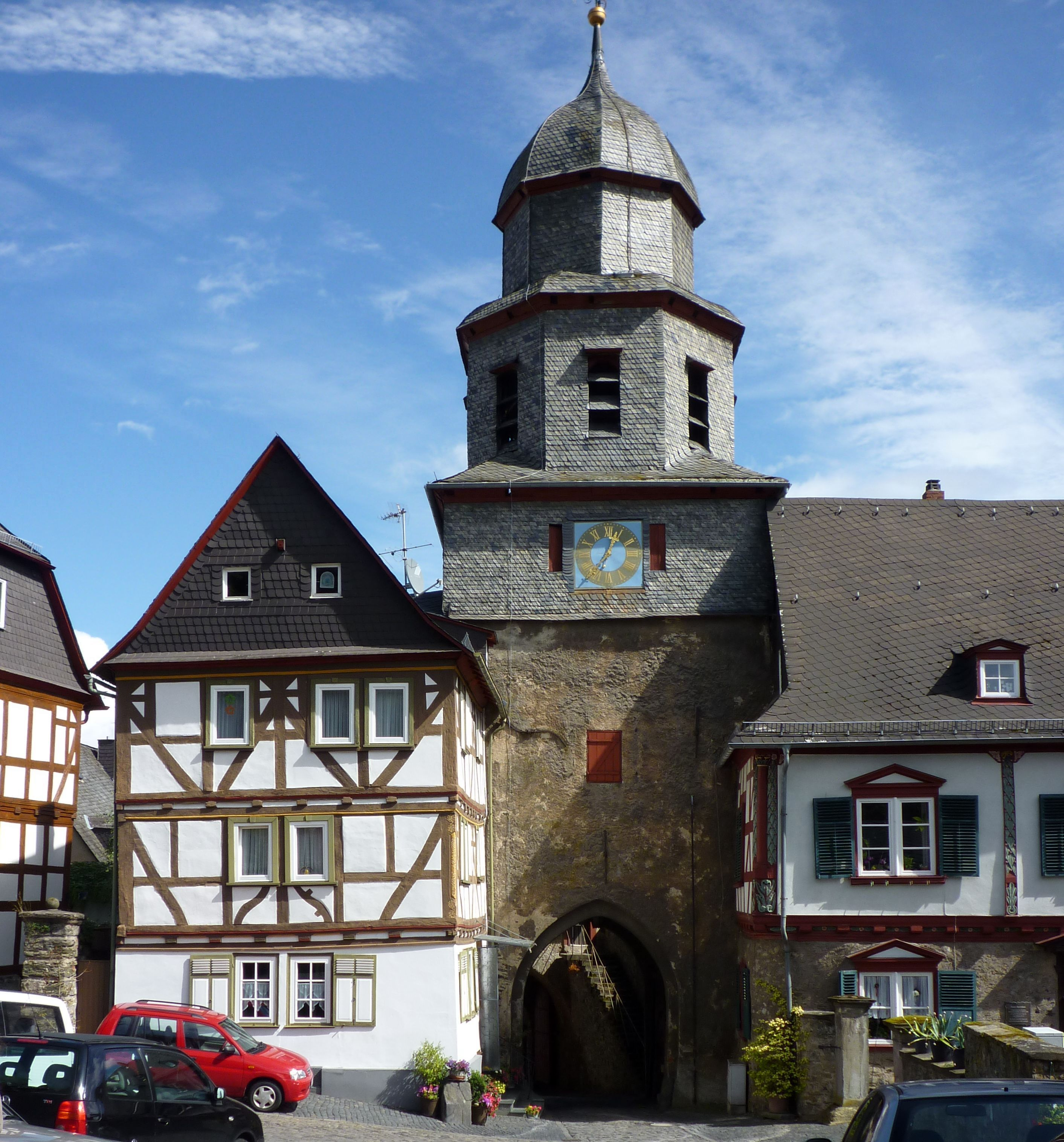 Braunfels - Fachwerkhaus mit Torturm.jpg